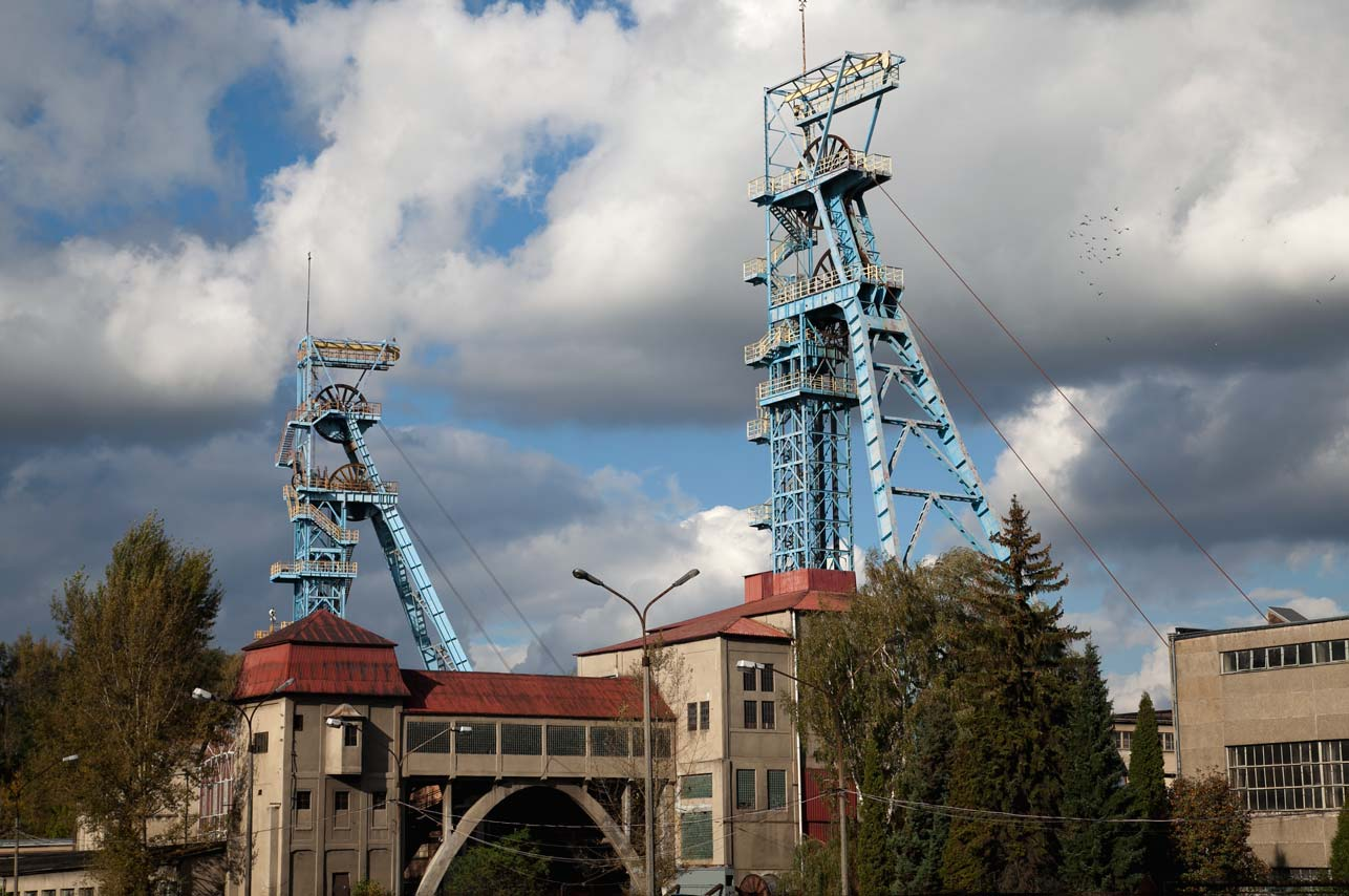 Kopalnia PG Silesia w Czechowicach - Dziedzicach (2011 rok).